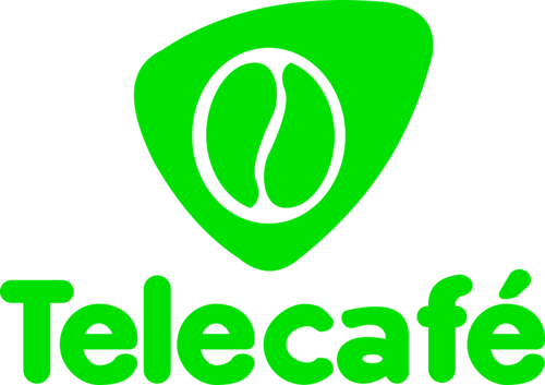 nuevo logo del canal regional